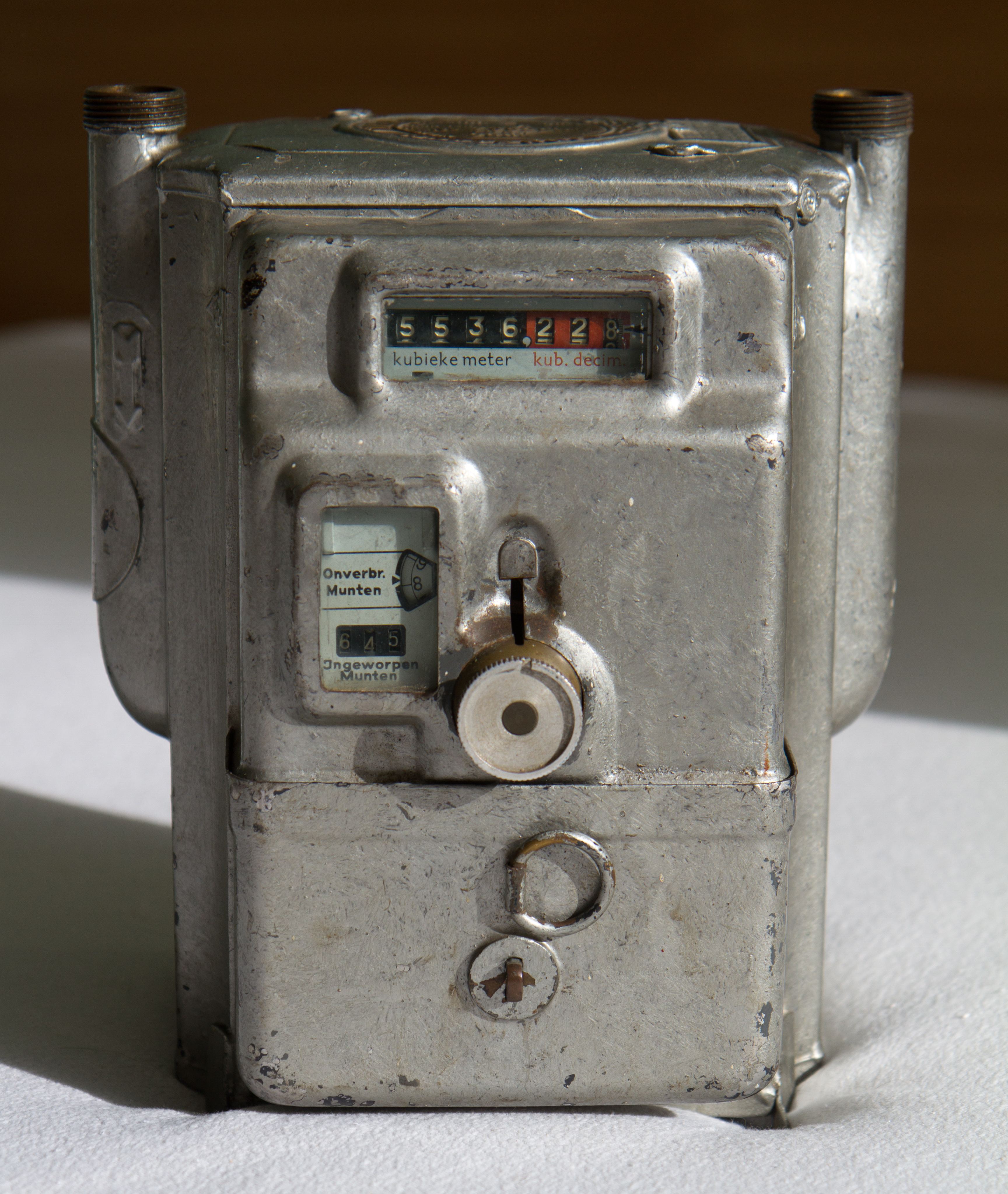 Gasmeter voor gaspenningen. Fabrikant: N.V. E.R.M.A.F. v/h Elster & Co., Rotterdam. Bouwjaar 1951. Oorspronkelijk geschikt voor penningen ter grootte van een 2,5 centstuk (23,5 mm), aangepast voor penningen ter grootte van een kwartje (19 mm). Vooraanzicht met gesloten muntbakje.